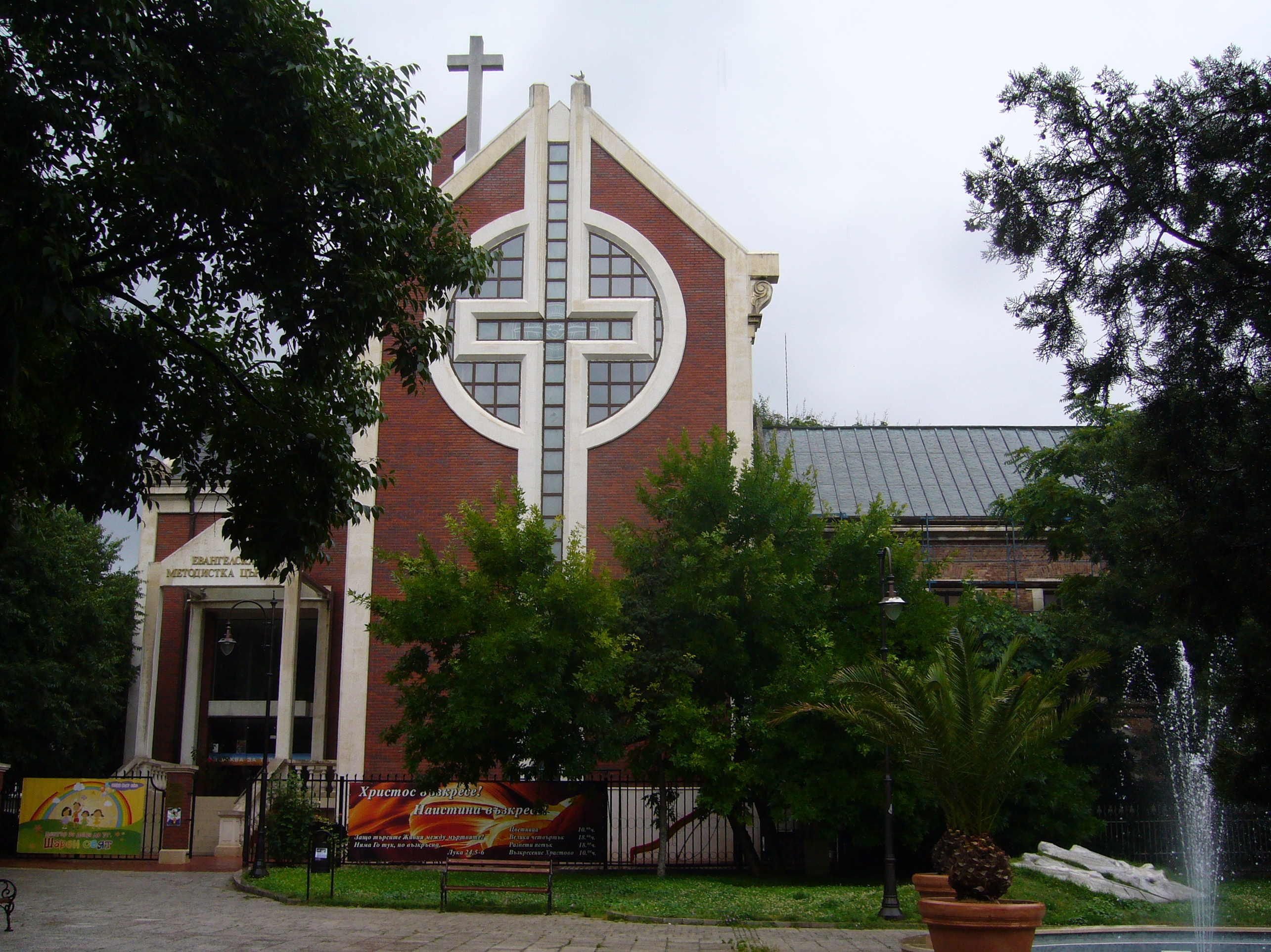 Varna, Bulgaria